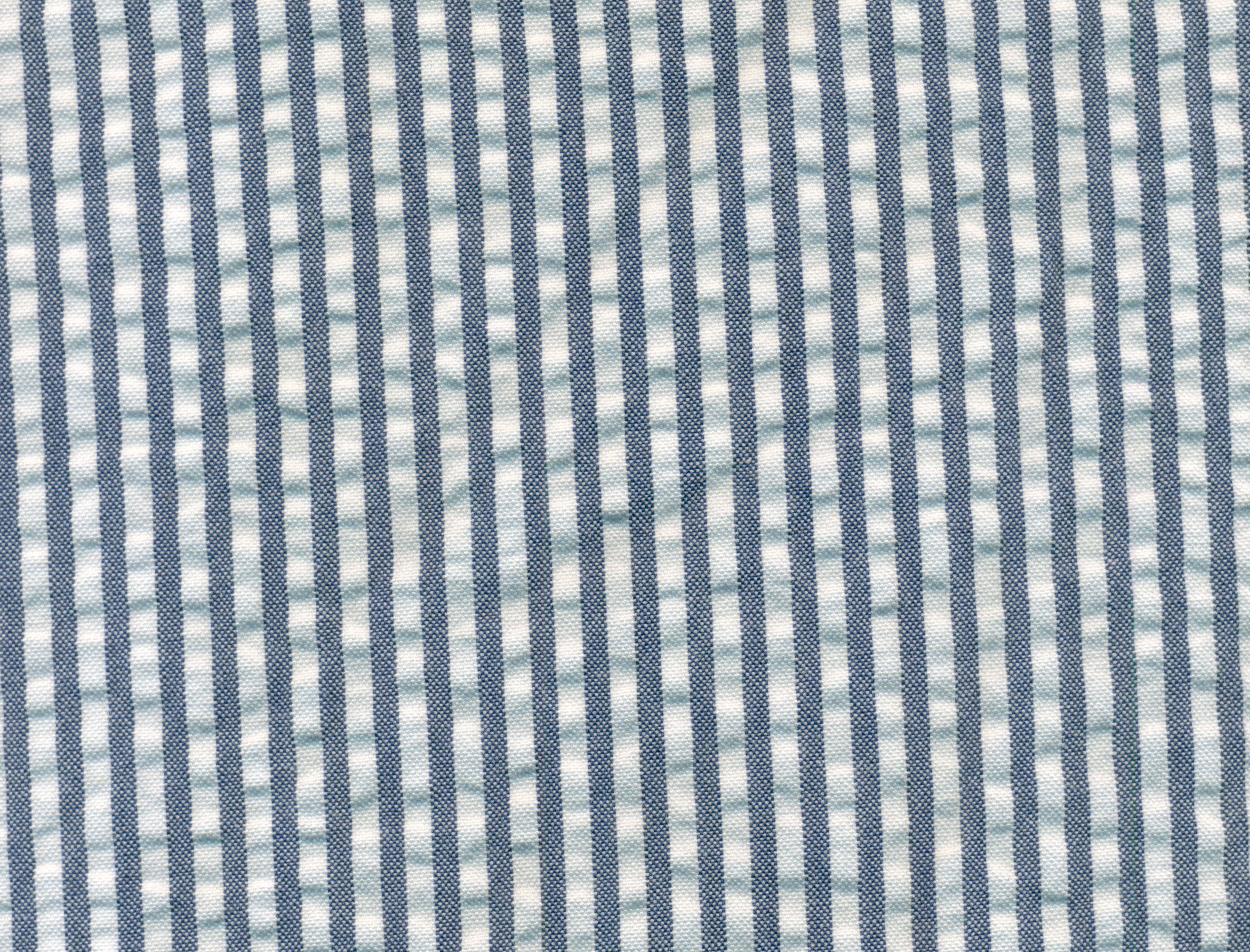 Seersucker Stoffmuster. 2-D-Scan